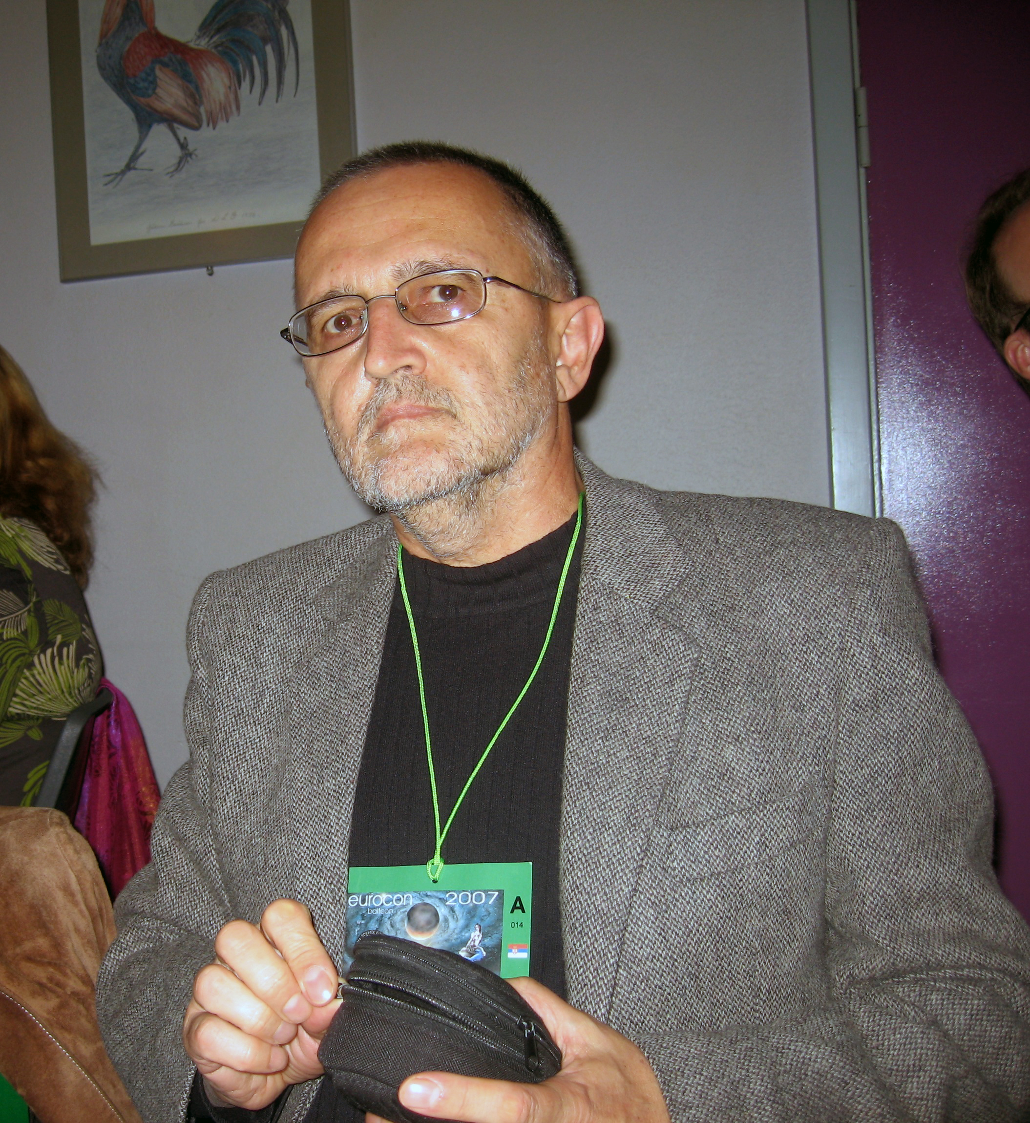 Zoran Živković at Eurocon 2007, Copenhagen.